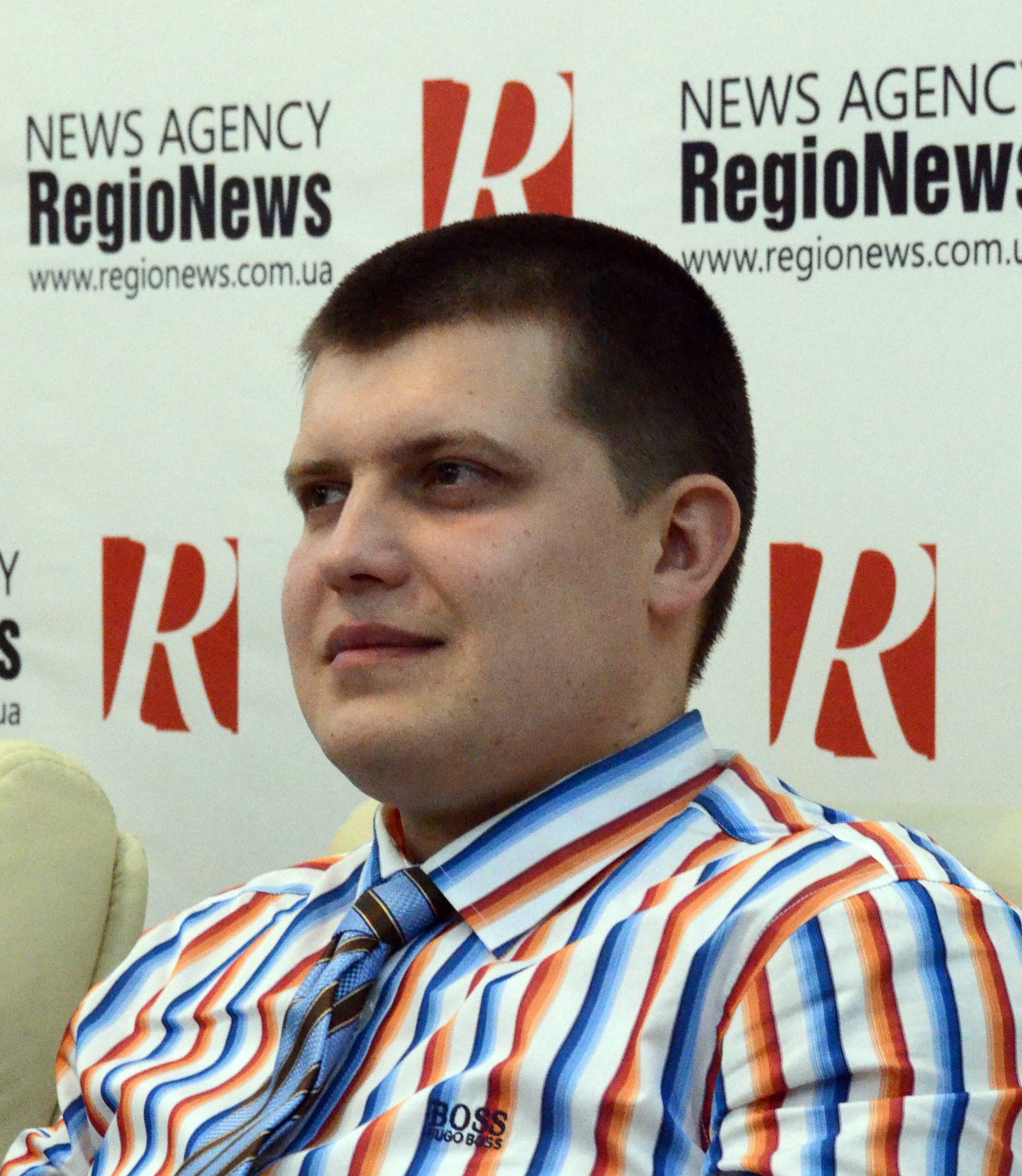 Прес-конференція з нагоди 9-річчя української Вікіпедії в ІА Regionews (м. Київ). Євген Букет